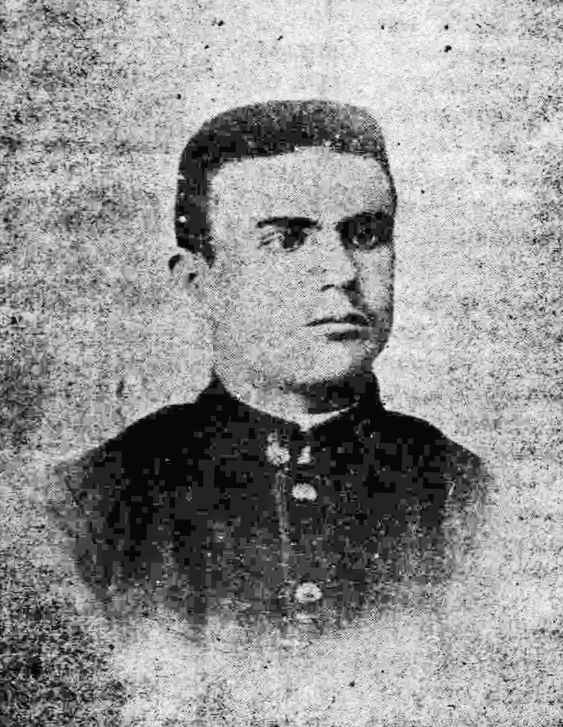 Дичо Андонов